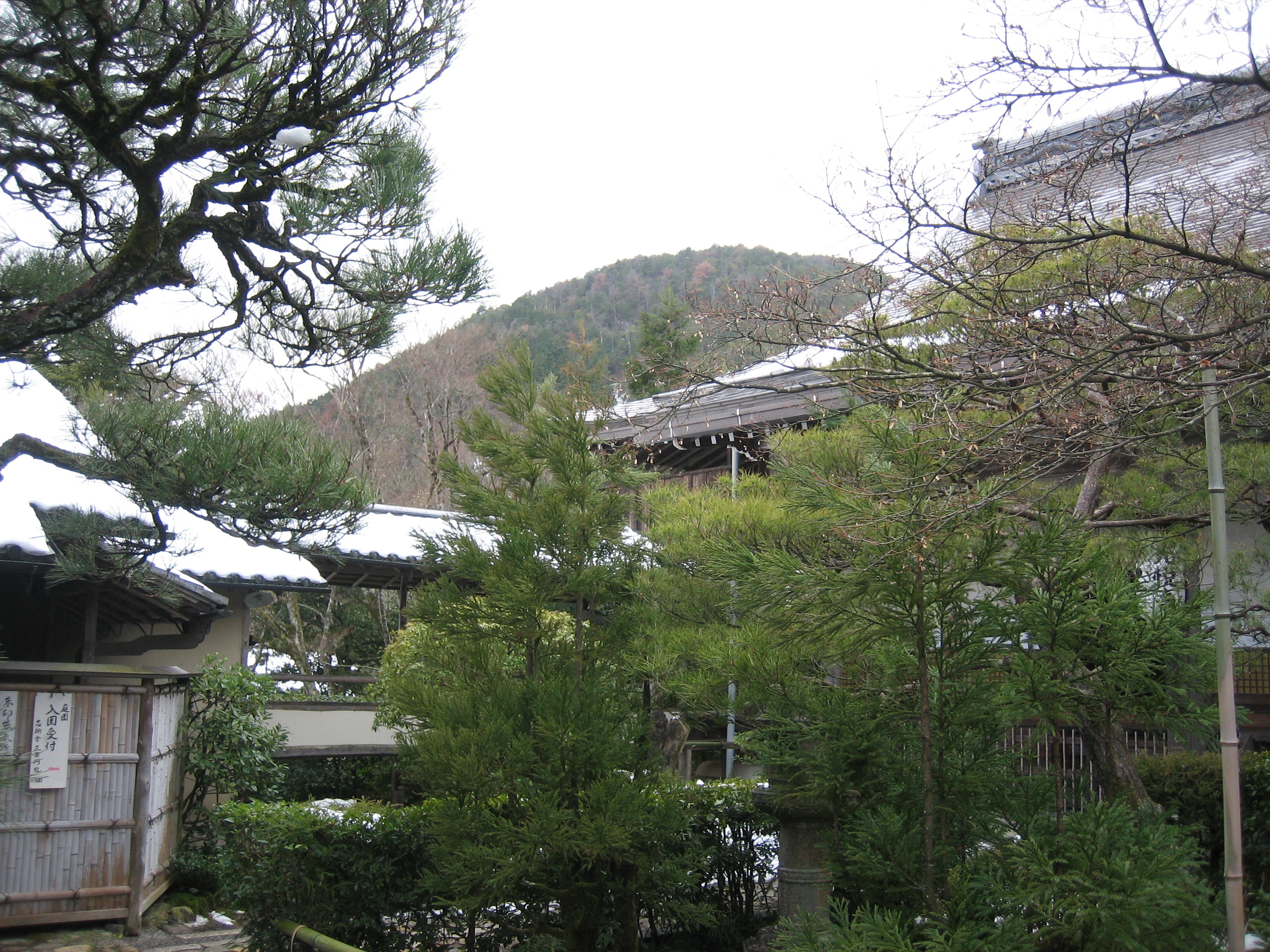 鷹峯丘陵を光悦寺から撮影